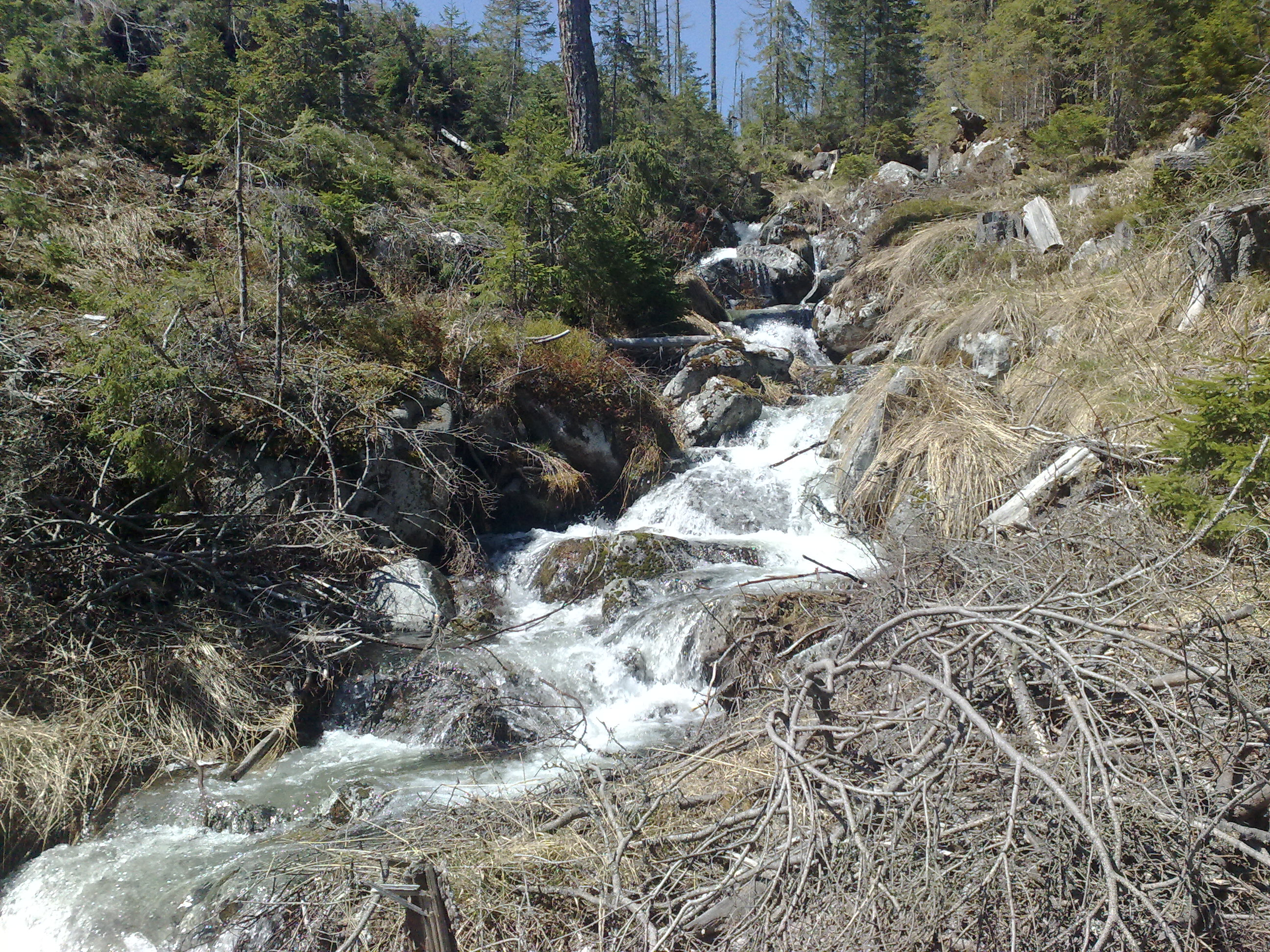 Batizovská Suchá Voda